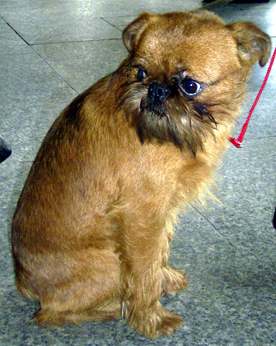 gryfonik brukselski